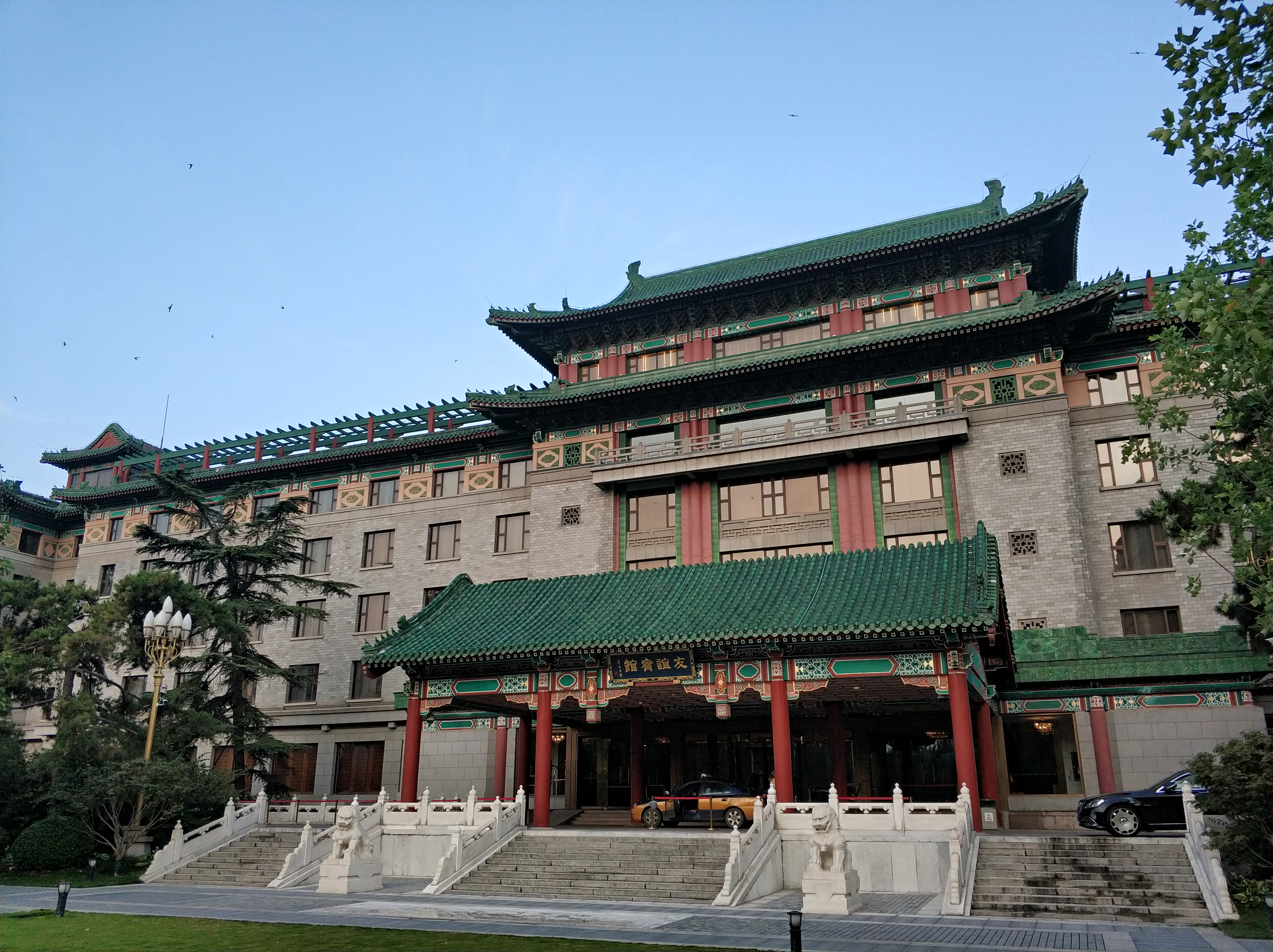 中文（中国大陆）: 北京友谊宾馆